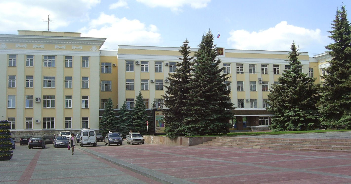 Здание администрации Брянской области, просп. Ленина, 33. памятник архитектуры 1920-х гг. (Дом Советов)